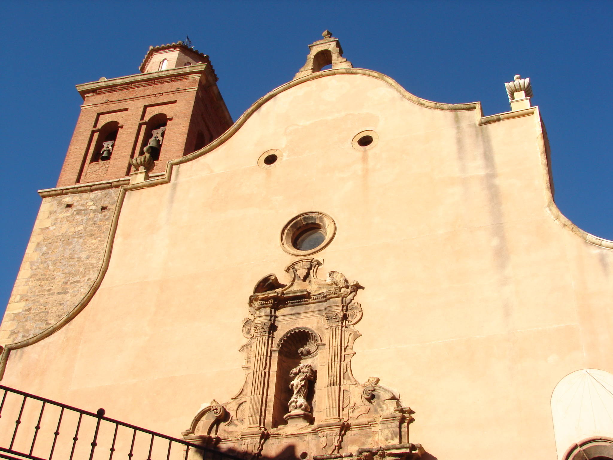 Se trata de una iglesia construida en el s.XVIII siguiendo el estilo barroco clasicista y concretamente el modelo jesuítico. Consta de tres naves, de las cuales es mayor la central, mientras que las laterales son el resultado de la comunicación de las profundas capillas laterales. Además cuenta con un crucero no marcado en planta, cabecera recta flanqueada por dos sacristías simétricas y coro alto a los pies. La nave central y los brazos del crucero se cubren con bóvedas de cañón con lunetos separadas por arcos fajones de medio punto que apoyan en una potente cornisa, mientras que las naves laterales se cubren con bóvedas de arista y el crucero con cúpula semiesférica sobre pechinas. La decoración del interior es típicamente barroca, sin embargo al exterior destaca la sobriedad de la fábrica de mampostería. La fachada presenta un remate mixtilíneo y una portada barroca de dos cuerpos, de los cuales el superior conserva una hornacina con una imagen de la Inmaculada bastante deteriorada. En el flanco occidental se alza la torre, que presenta un primer cuerpo de mampostería, planta cuadrada y gran altura y un segundo de ladrillo, planta cuadrada y rematado por un tercer cuerpo octogonal de reducidas dimensiones.